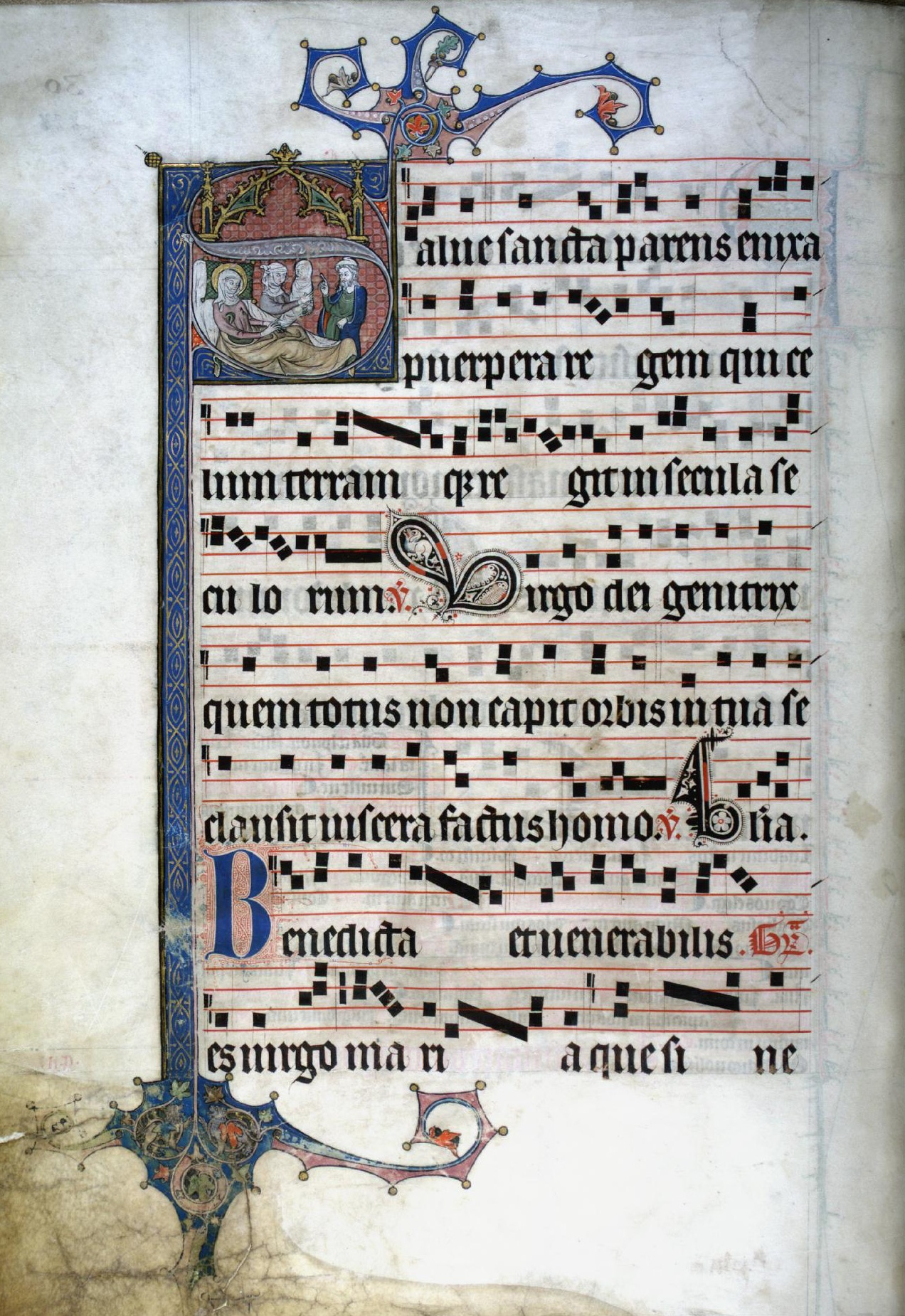 Graduel de Cologne Naissance de Marie 227r